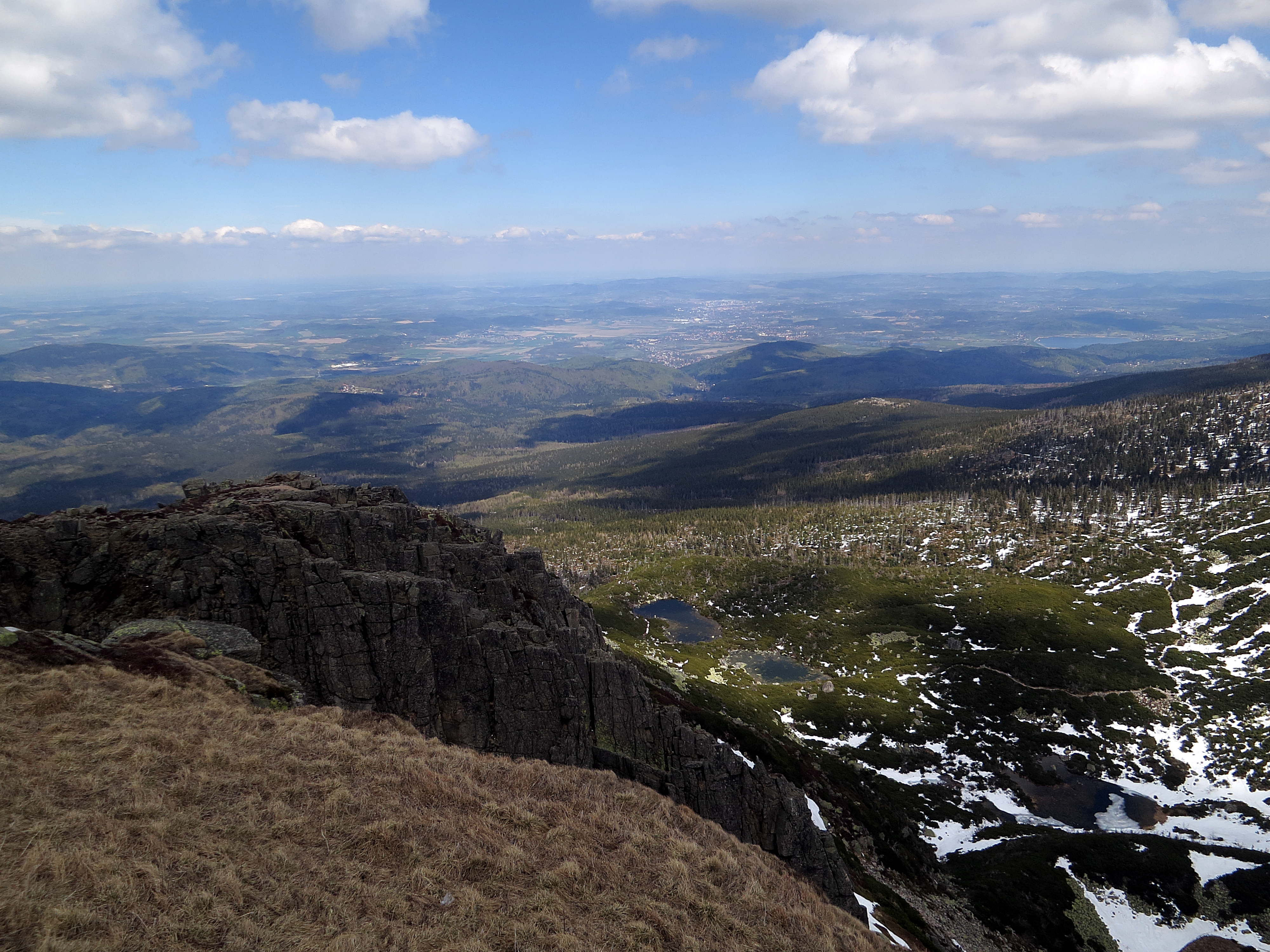 Obszar specjalnej ochrony ptaków Karkonosze. Karonoski Park Narodowy This is a photography of Natura 2000 protected area with ID PLB020007